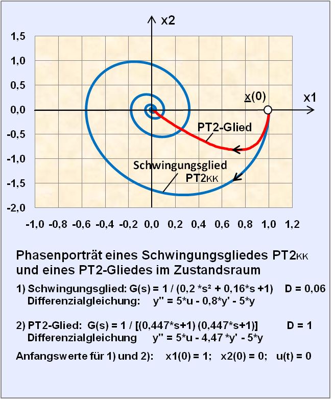 Bewegung der Zustandsvariablen eines Schwingungsgliedes im Zustandsraum